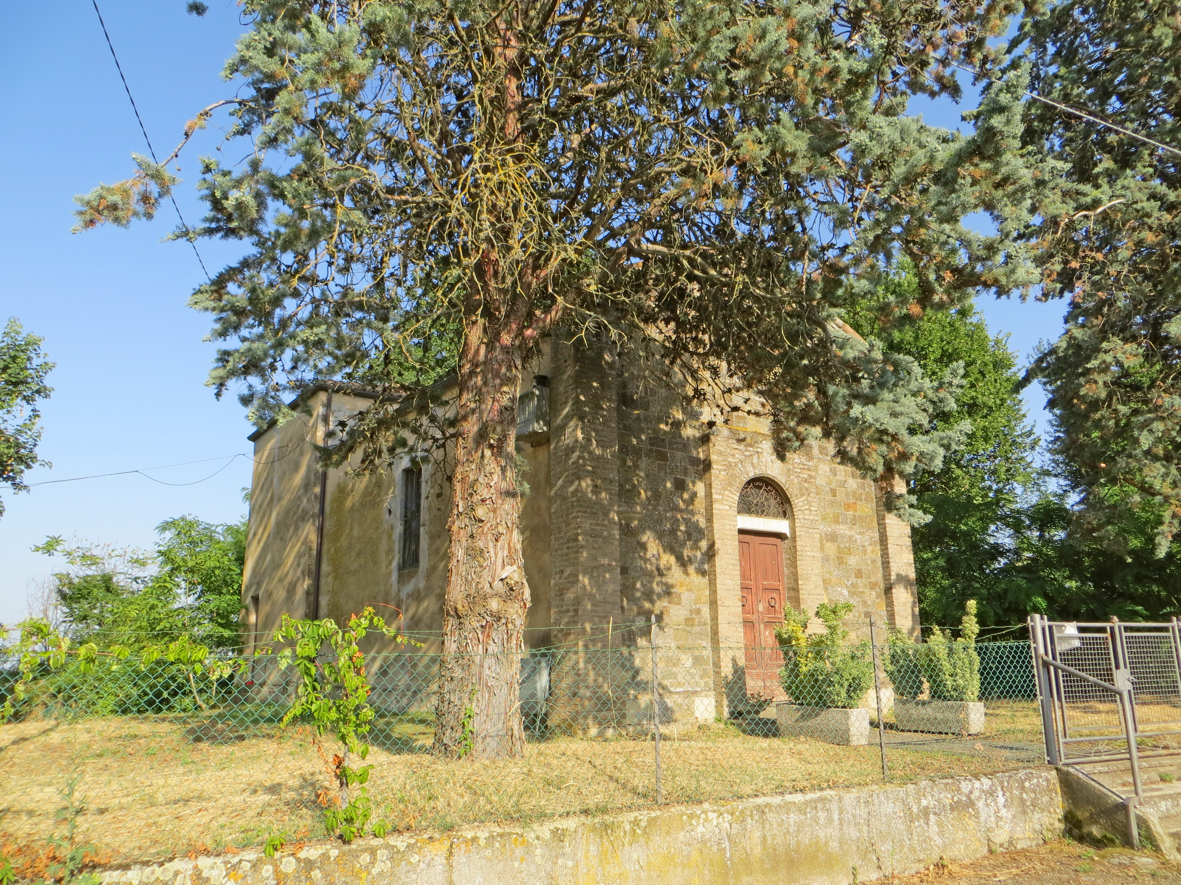 Oratorio di San Geminiano (Vignale, Traversetolo) - facciata e lato nord